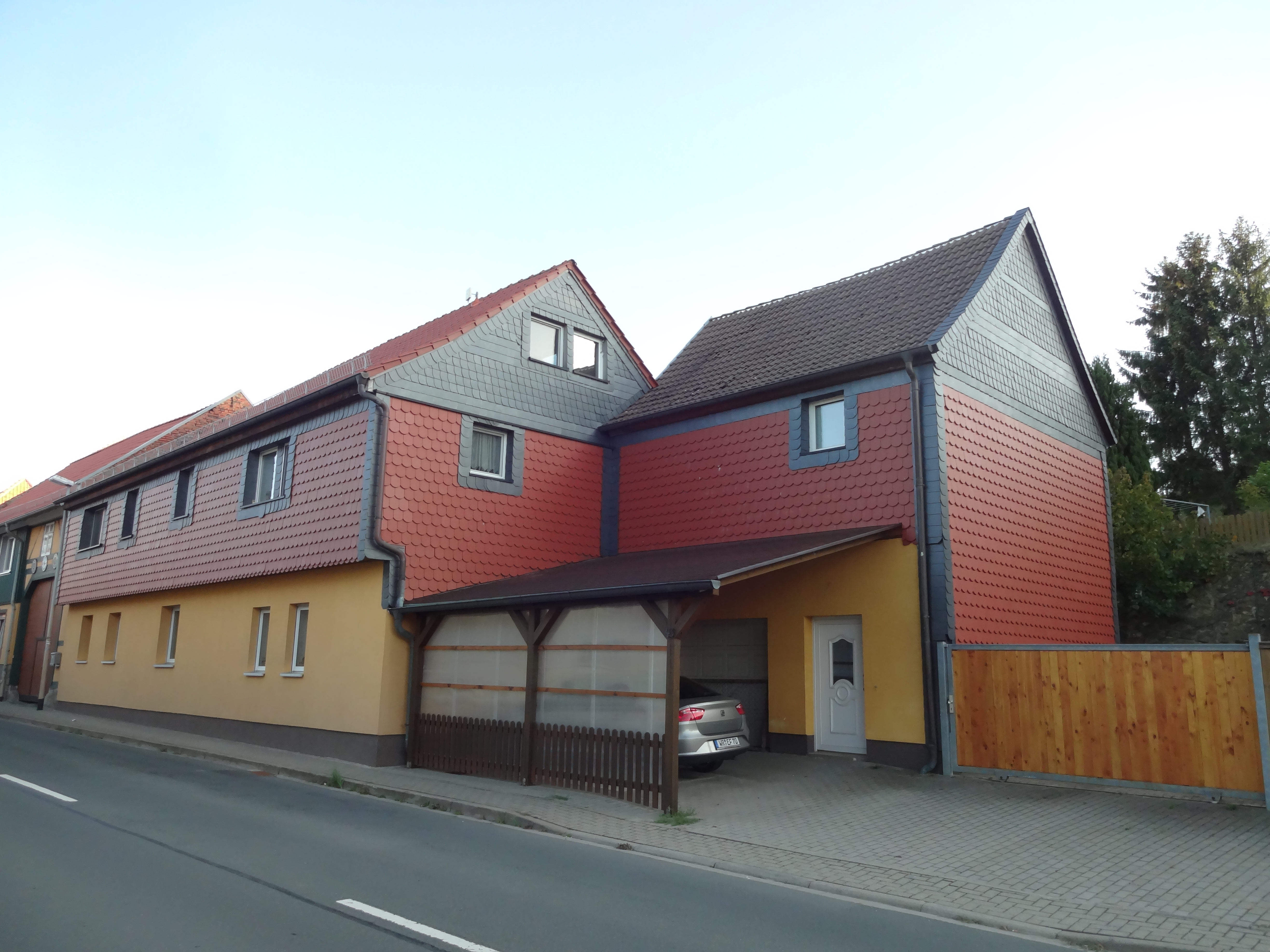 ehemals denkmalgeschütztes Wohnhaus in der Wilhelm-Pieck-Straße 43 in Heimburg